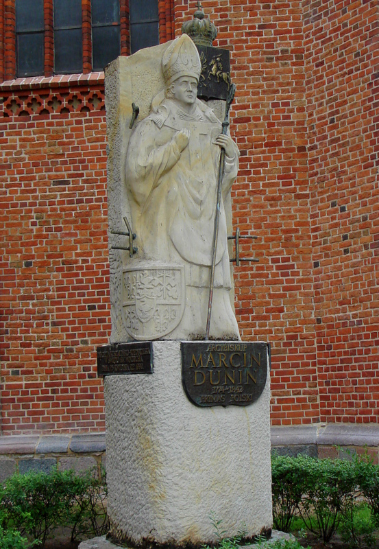 Bazylika konkatedralna Wniebowzięcia Najświętszej Maryi Panny Kołobrzeg